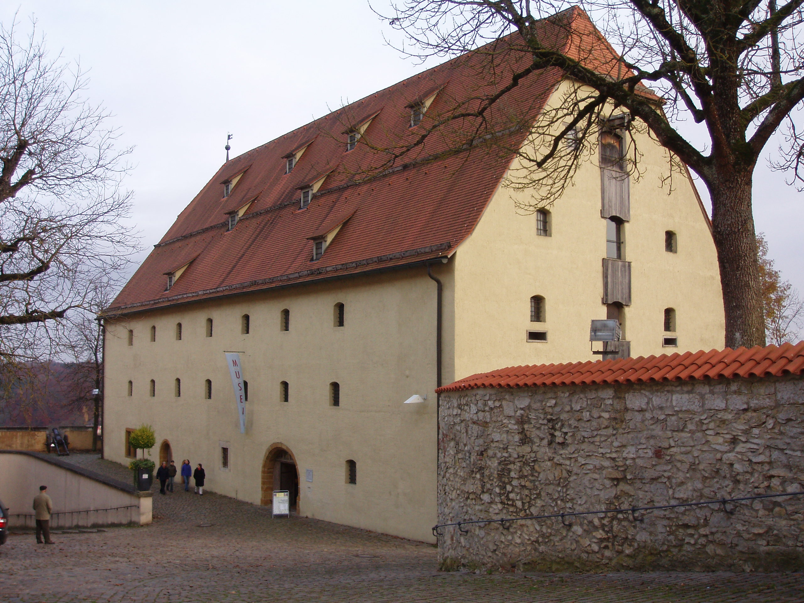 Museum für Kutschen, Chaisen, Karren, Schloss Hellenstein